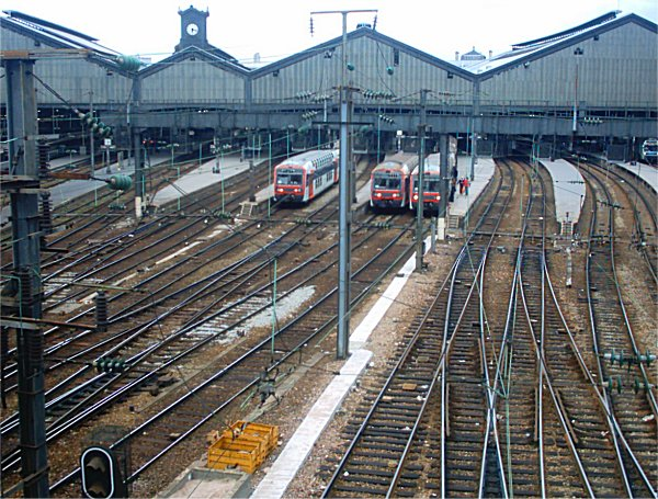 St Lazare station seen from La Place de l'Europe, Paris